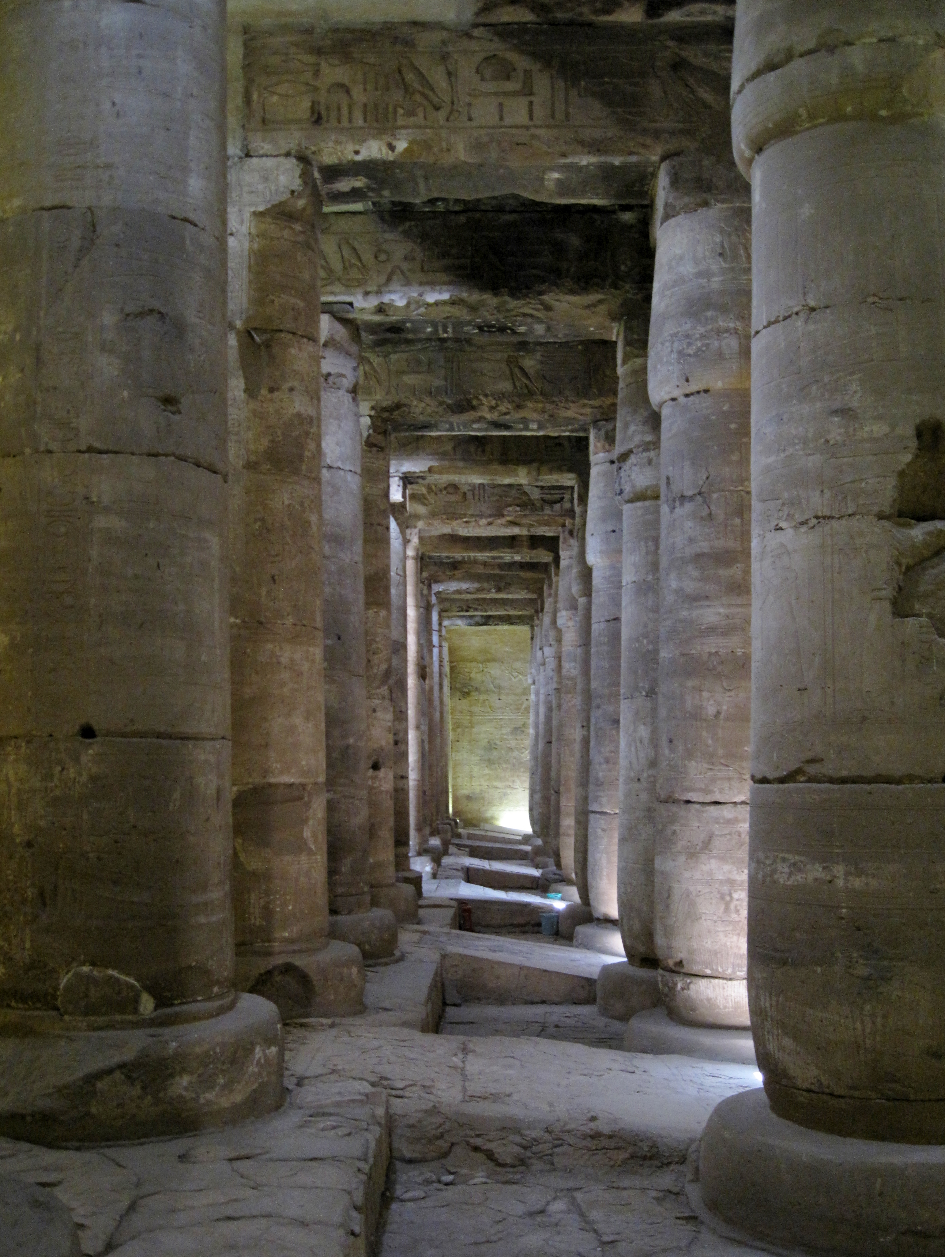 Zweite Hypostylhalle im Totentempel Sethos I. in Abydos, Ägypten